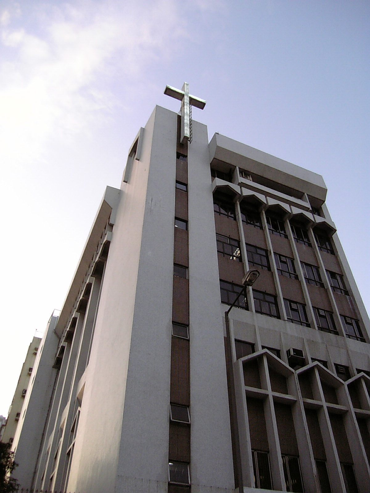 Kowloon Ling Liang Church